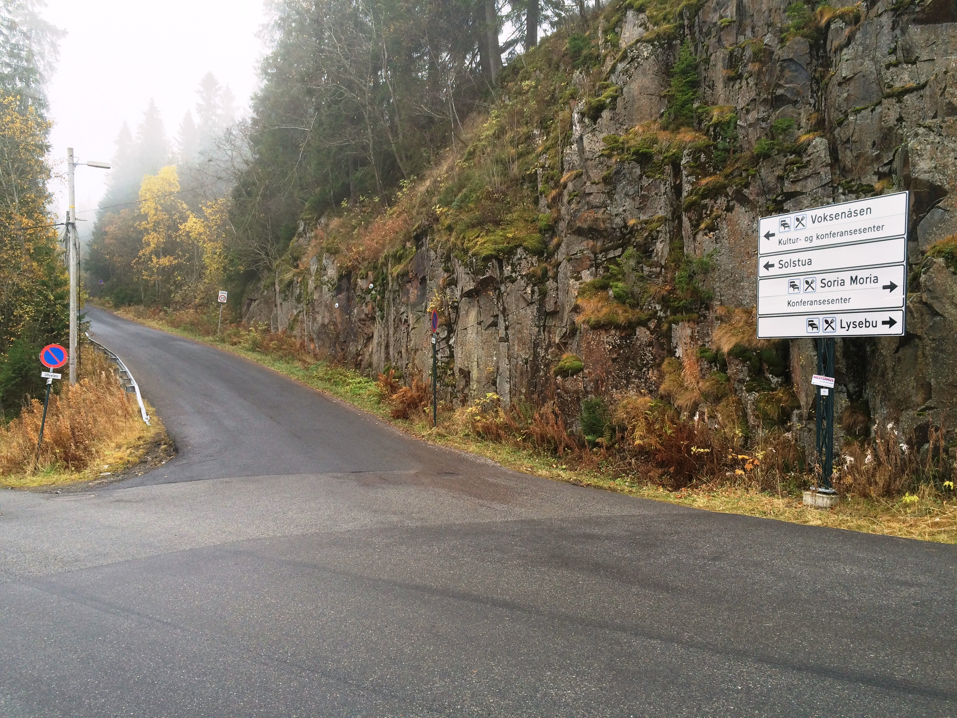 Ullveien like ved Voksenkollen stasjon